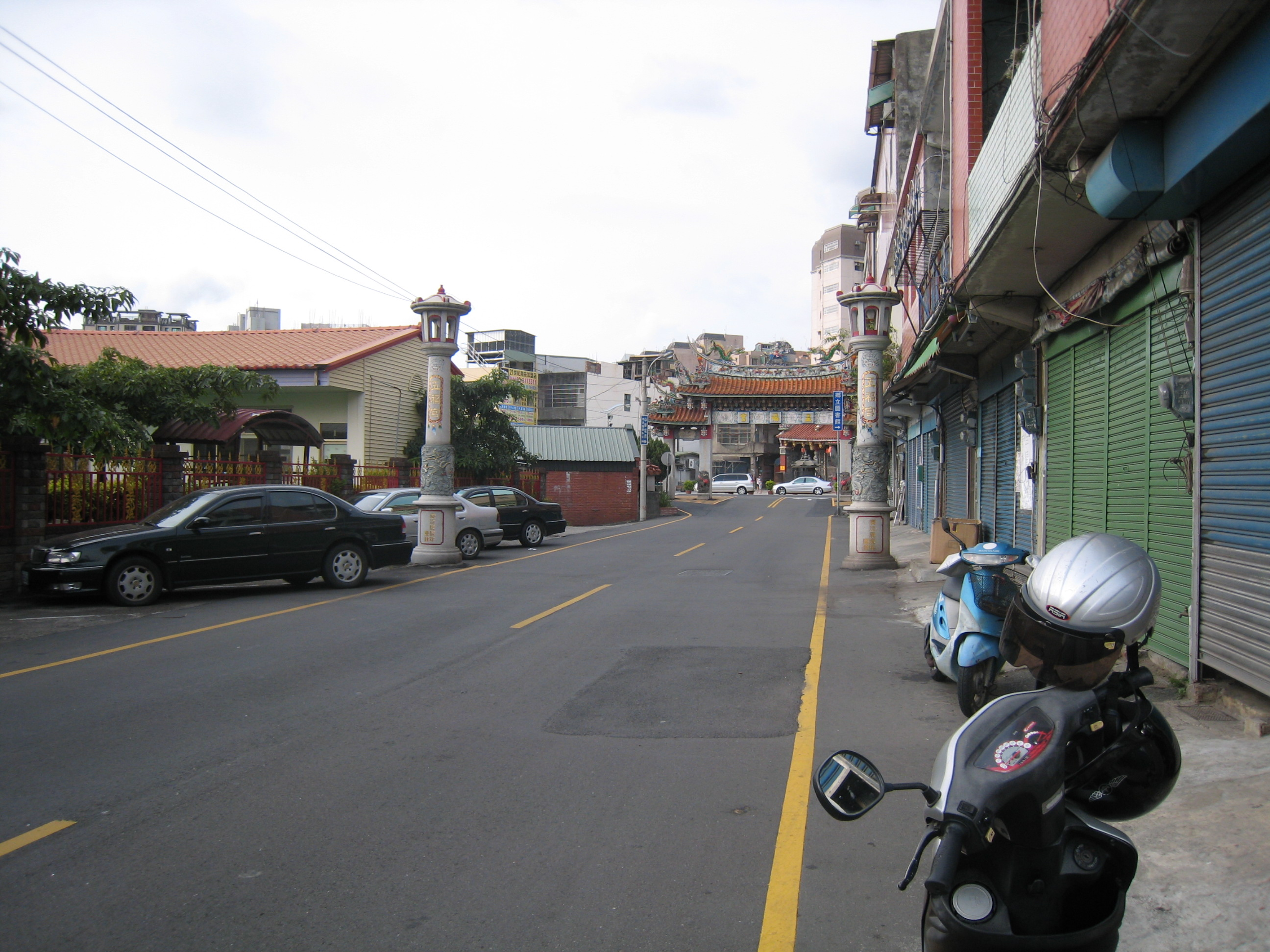 南山路二側原有六對（12支）日式燈柱，其中有兩柱（1對）已遺失。